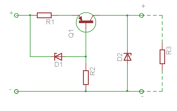 Püsivooluallikaga pingestabilisaator